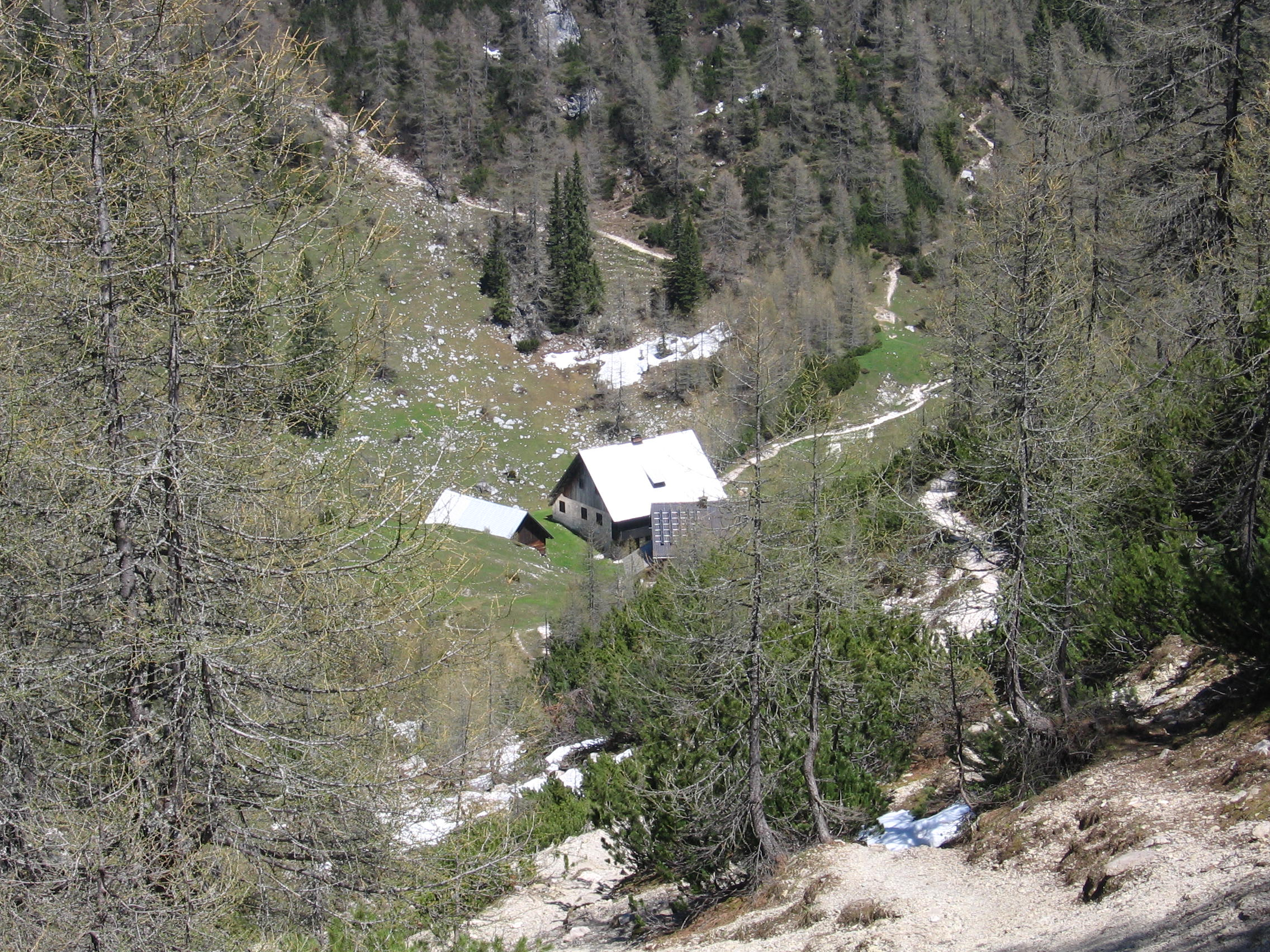 Lipanska planina z Blejsko kočo na Pokljuki